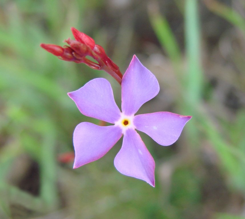 Mandevilla tenuifolia - APOCYNACEAE Chapada Imperial - Distrito Federal - Brasil. Espécie polinizada exclusivamente por borboletas (psicofilia).